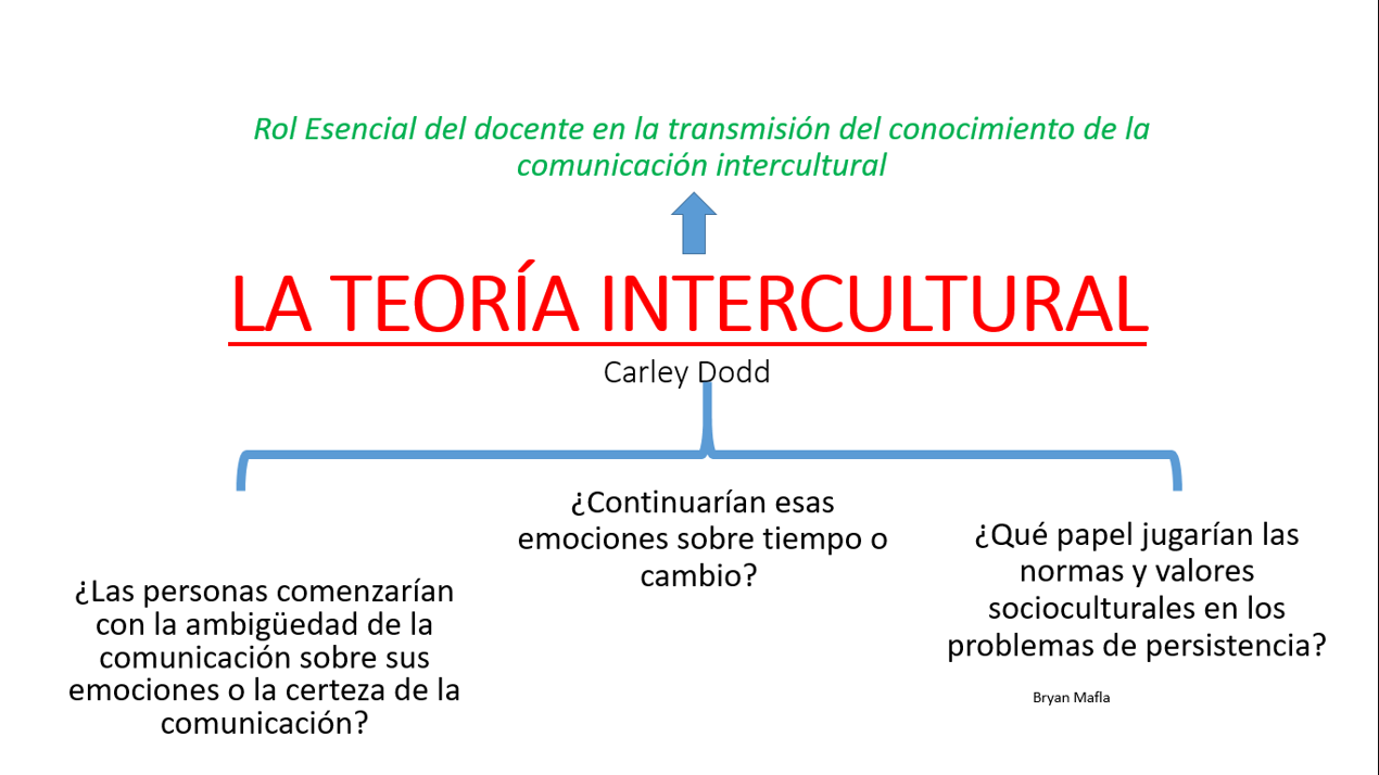 teoria intercultural, 3 preguntas